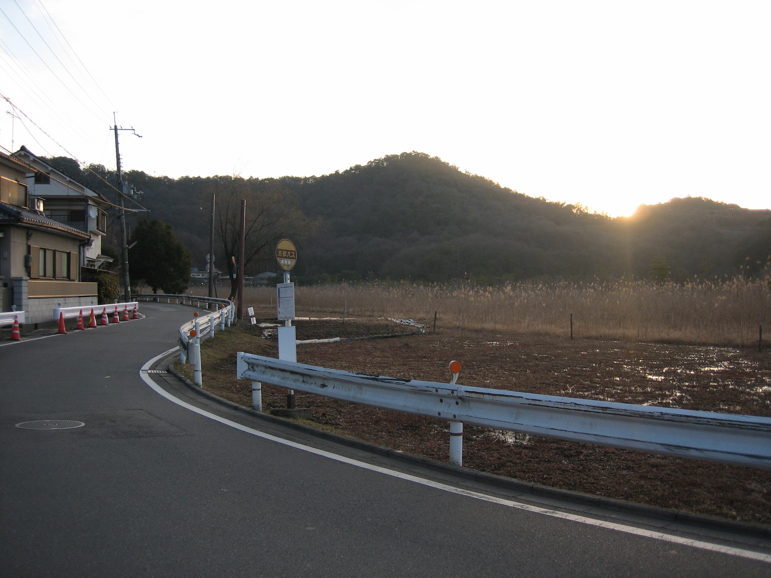 深泥池および市道岩倉上賀茂線を北区上賀茂狭間町から撮影